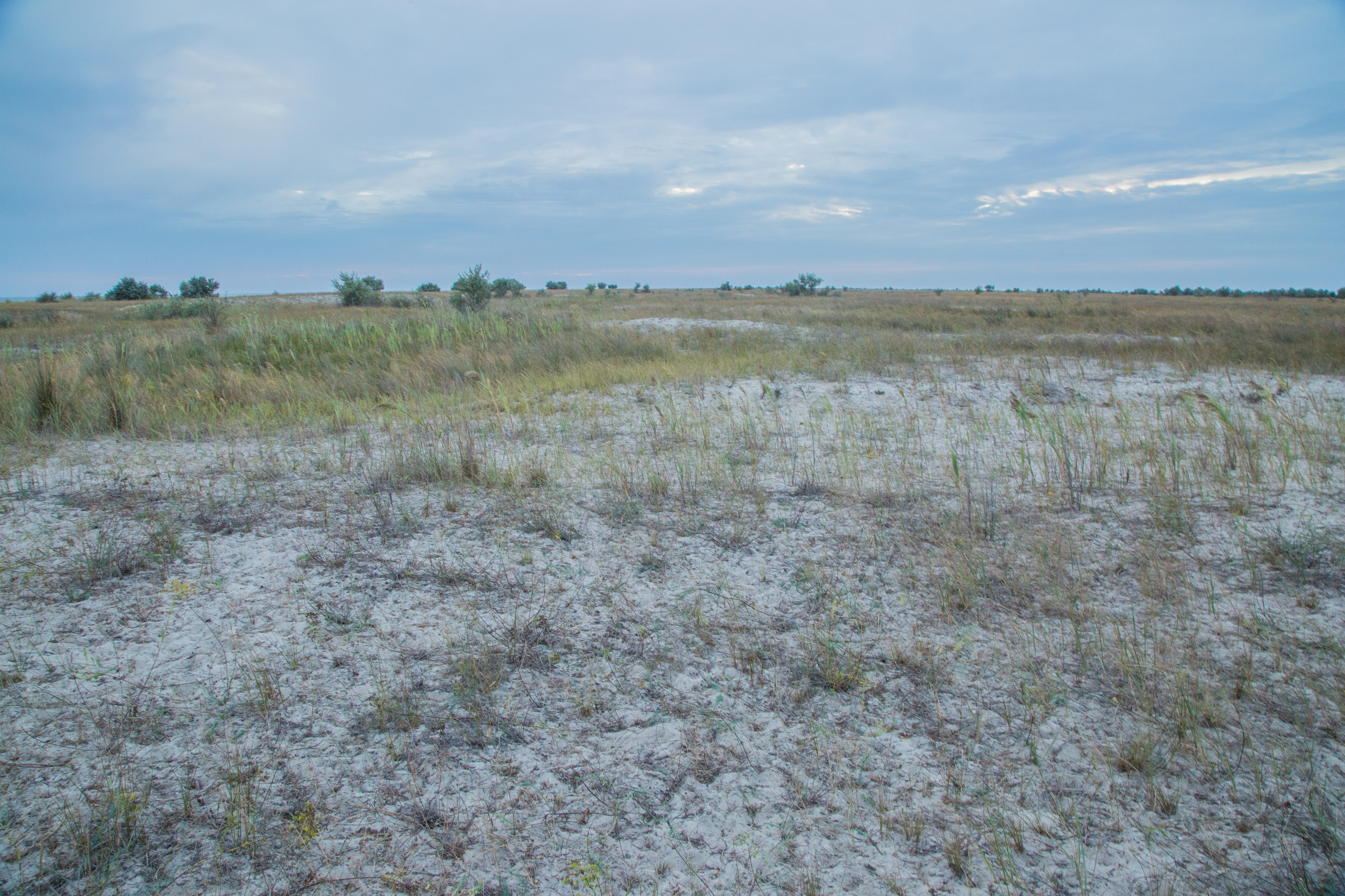 Знято під час експедиції на о. Джарилгач This photo/video of Dzharylhach was taken during Wikiexpedition to Dzharylhach supported by Wikimedia Ukraine. You can see all photographs in category Category:Wikiexpedition to Dzharylhach. English | українська | +/−